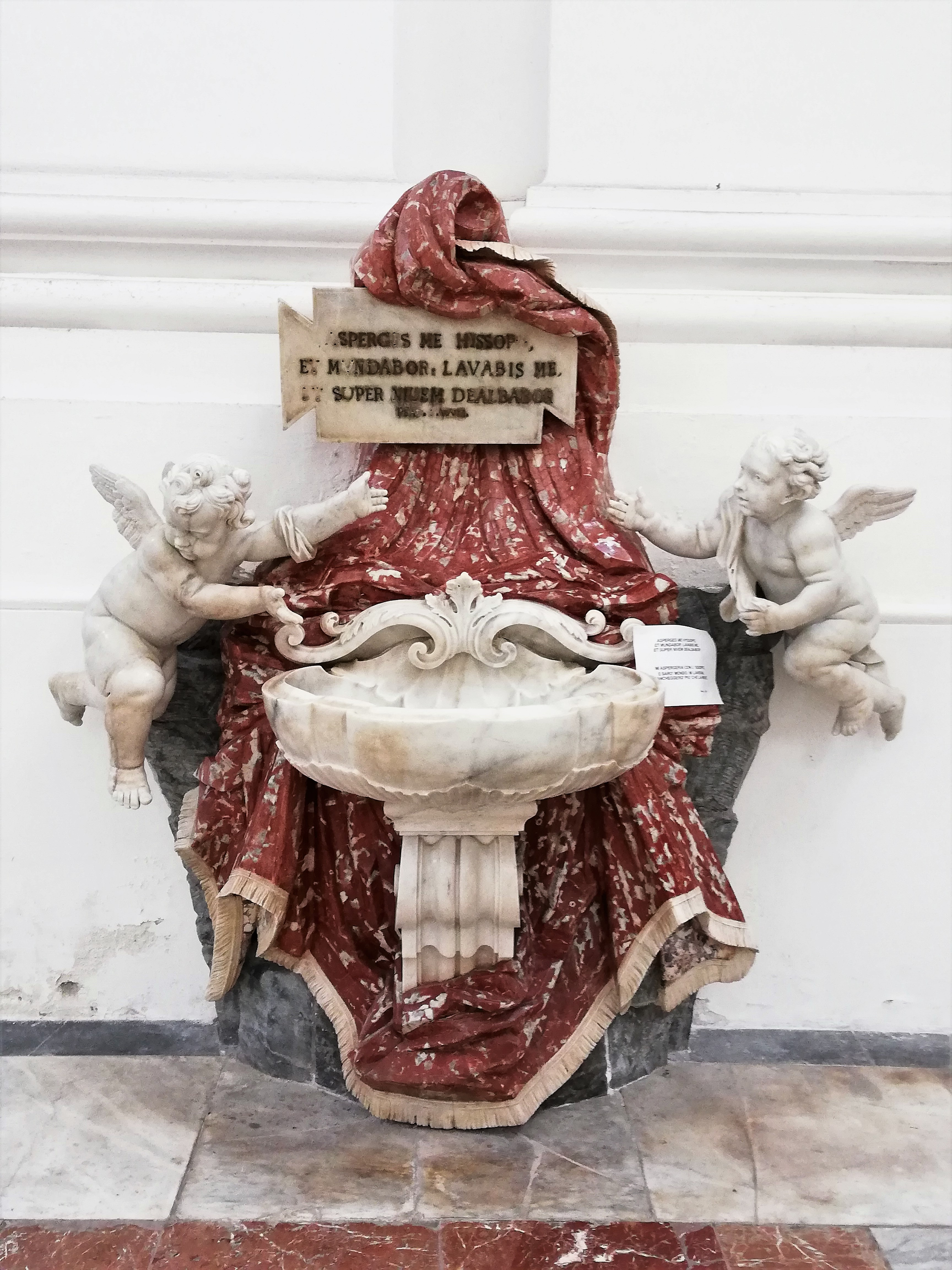 Acquasantiera sinistra.